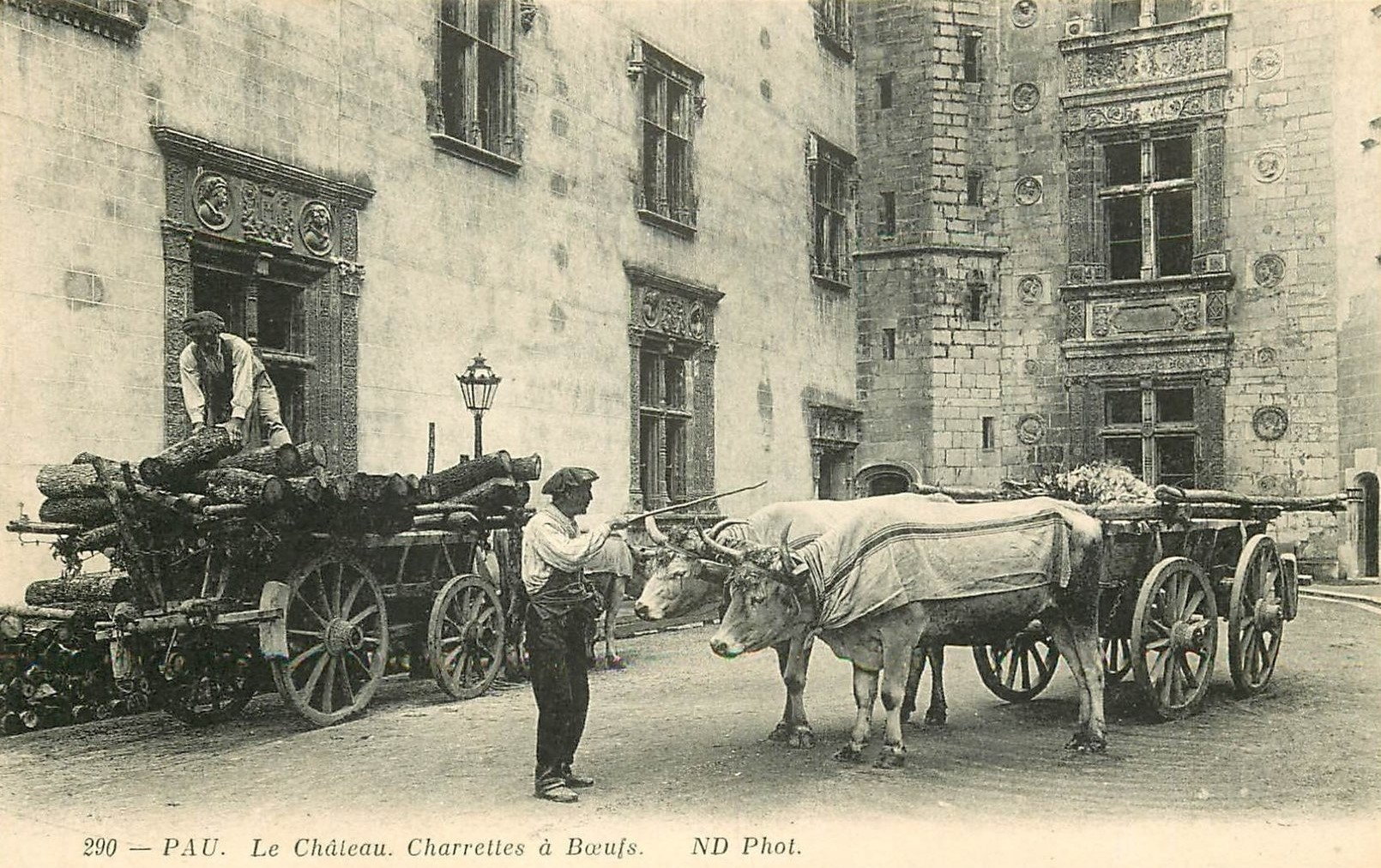 Carte postale "Le château de Pau, charrettes à bœufs".